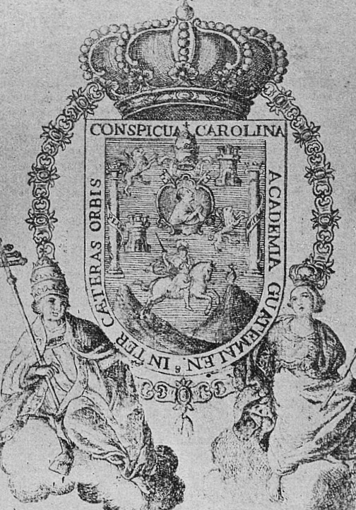 Escudo de la Real y Pontificia Universidad de San Carlos de Guatemala. Siglo XVIII. Publicado en la Revista La Locomotora el 10 de enero de 1907